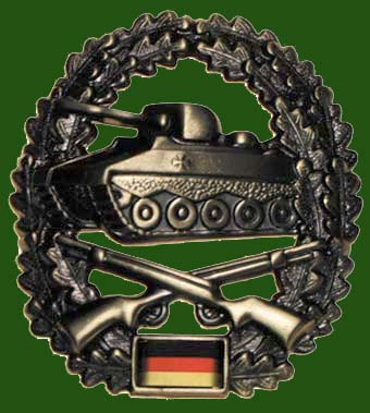 Barettabzeichen Panzergrenadiertruppe der Bundeswehr. Hintergrund: Farbe des Baretts